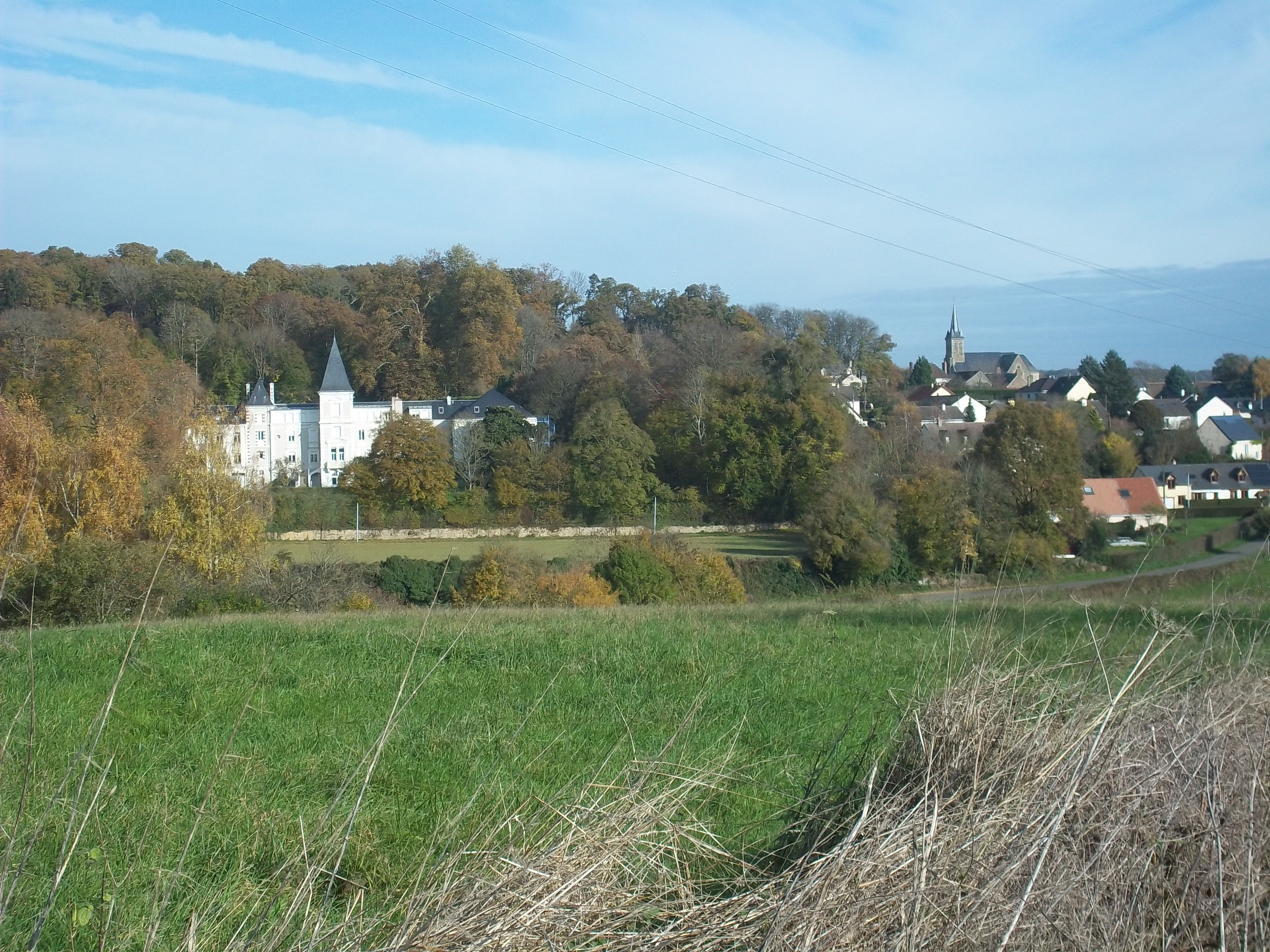 vue générale avec le chateau